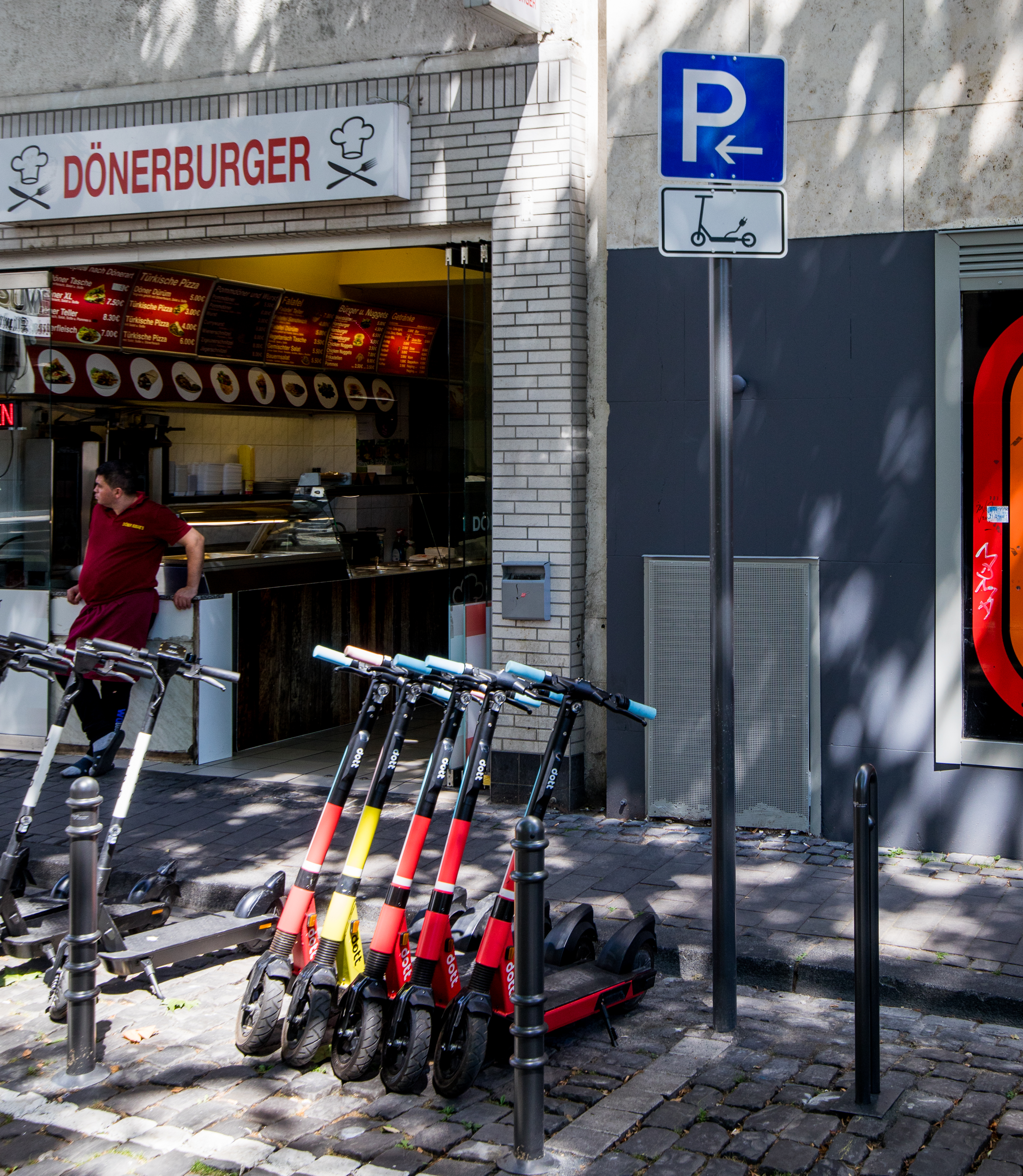 Parkplatz für E-Scooter, Seidmacherinnengäßchen, Köln mit 5 E-Scootern der Marke Dott